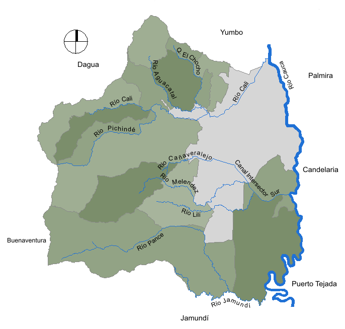 Mapa de los ríos de Cali, Colombia